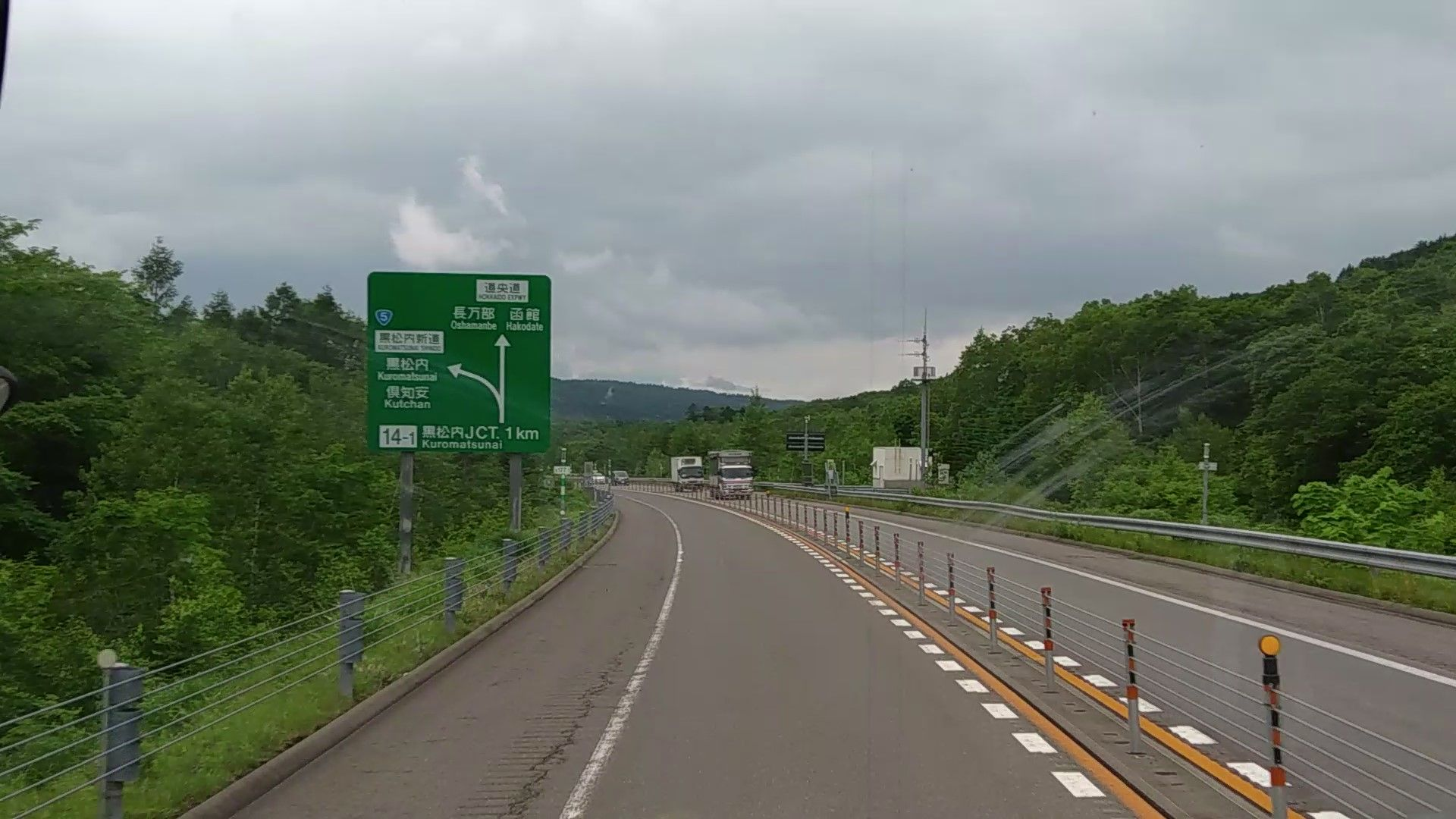 黒松内ジャンクション・方面と方向の予告（1km先、札幌側から、2018年7月撮影）分岐のみの表示となっている